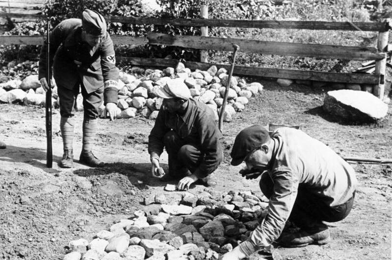 Sommer 1941 Deutsche Frontarbeiter im Osteinsatz In einem Dorf bei Grodno hält ein Frontarbeiter Juden zur Arbeit an. F.Z. [Organisation Todt]